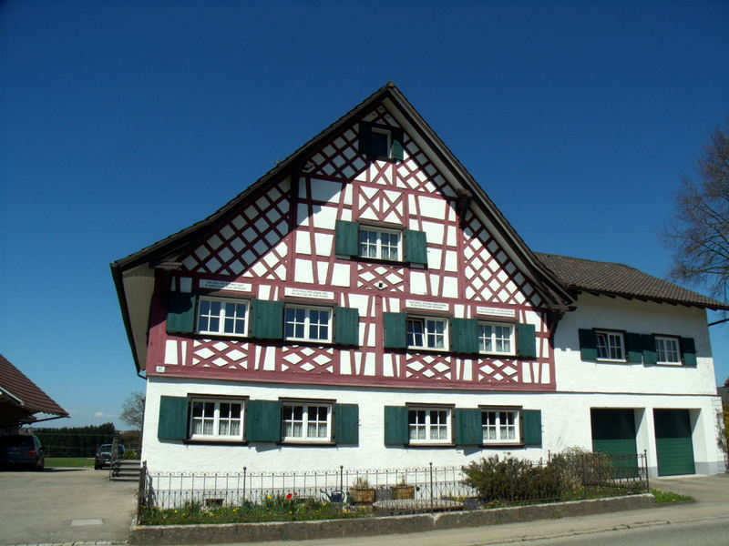 Sigmarszell